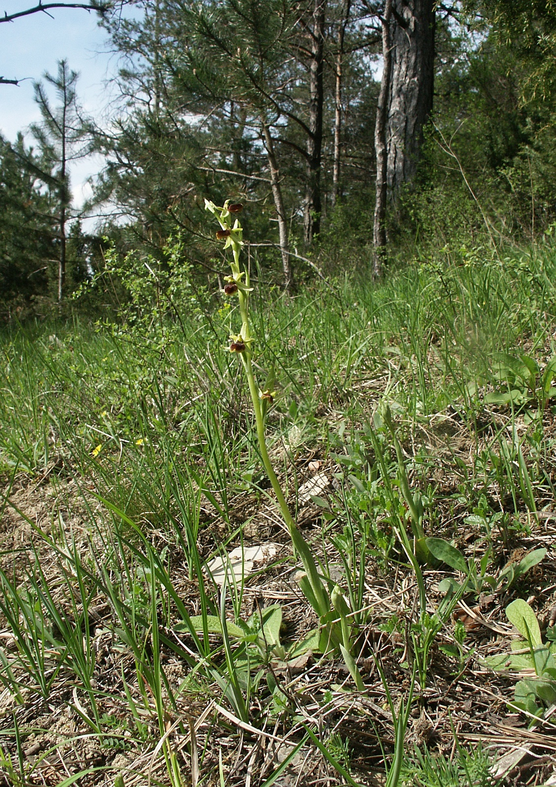 Ophrys araneola, Baden-Württemberg, Germany